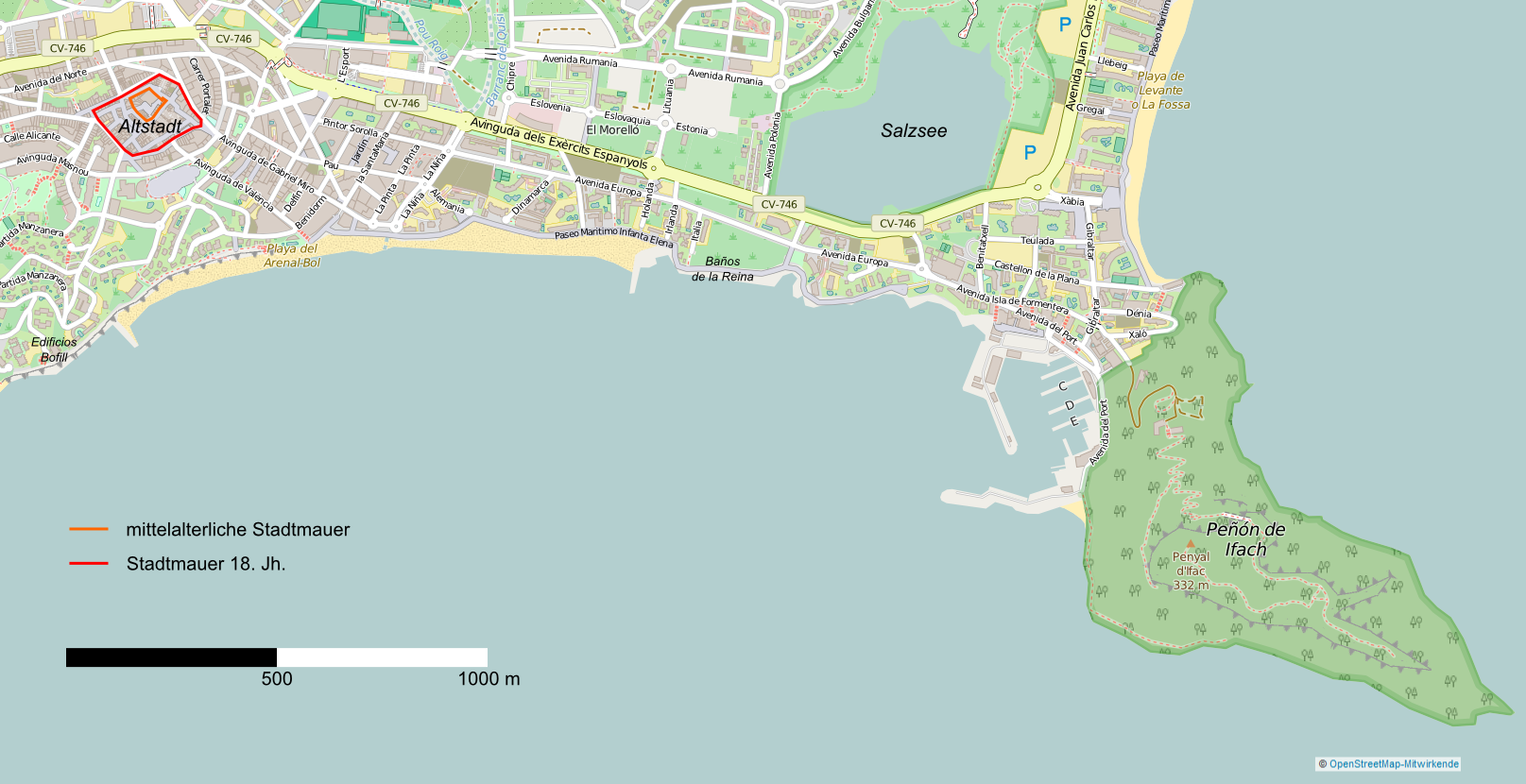 Stadtplan Calp